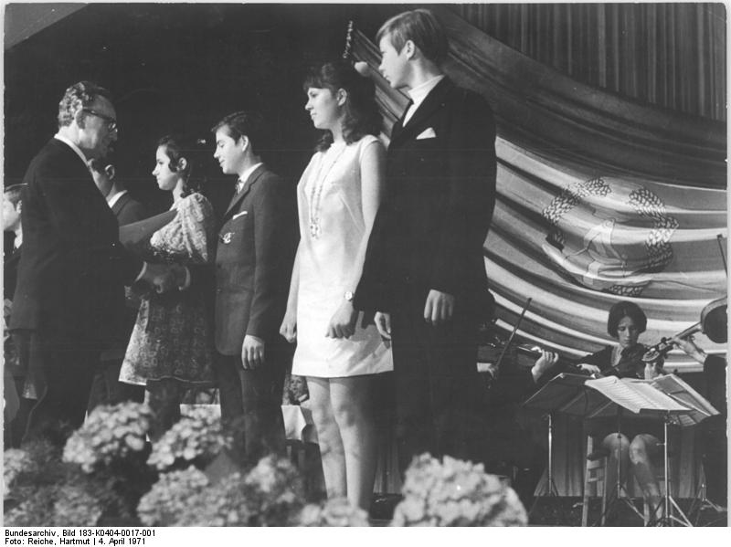 Berlin, Jugendweihe, Kurt Fichtner Zentralbild Reiche 4-4-1971-ba Berlin: Zum Eintritt in den neuen Lebensabschnitt übermittelte Dr. Kurt Fichtner (l), Stellvertreter des Vorsitzenden des Ministerrates der DDR, 69 Mädchen und Jungen im Namen des Ministerrates die herzlichsten Glückwünsche. Die Schüler der 3. Köpenicker Oberschule erhielten am 4.4. im Robert-Bunsen-Saal in der Akademie der Wissenschaften Berlin-Adlershof die Jugendweihe.